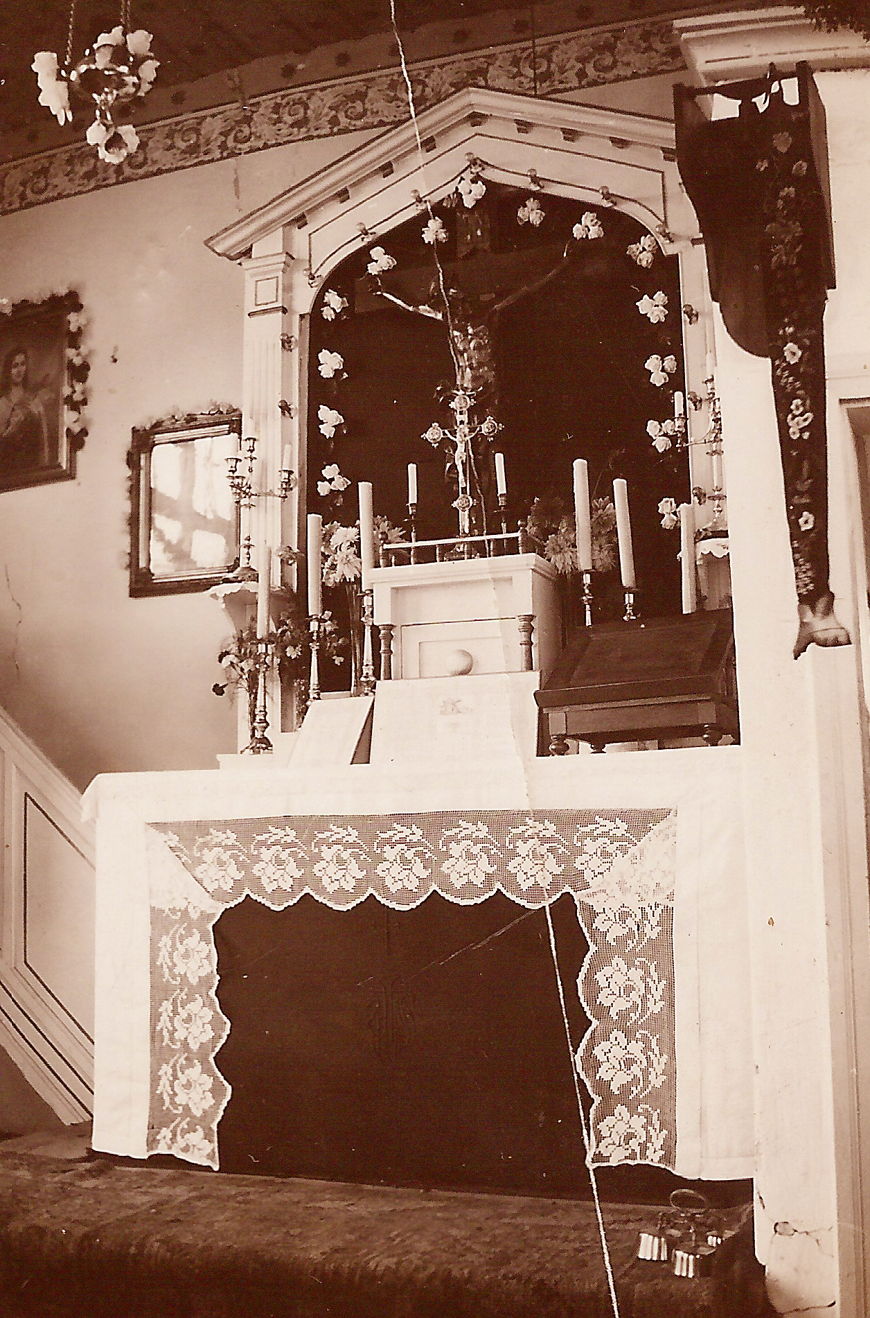 ołtarz nieistniejącej kaplicy z Otłoczyna. Wybudowana w 1867 roku spalona przez Niemców w 1939 roku